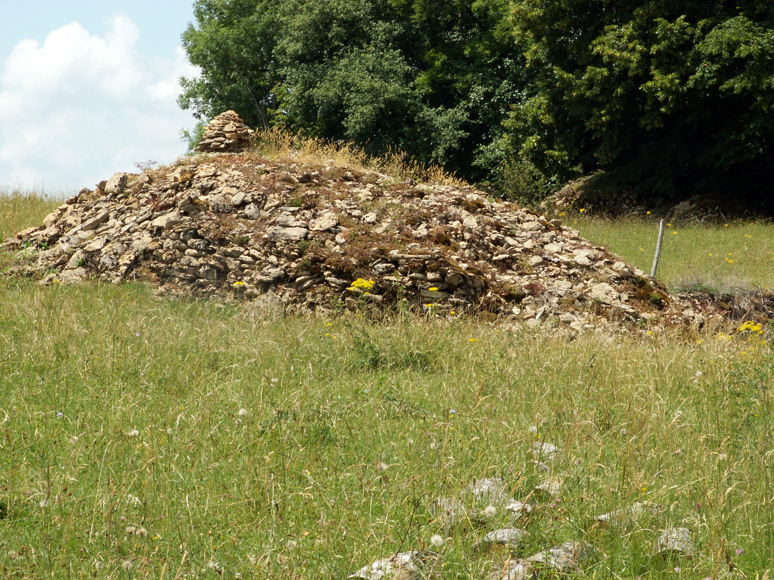 Sermu, Jura, ancien habitat en lauzes